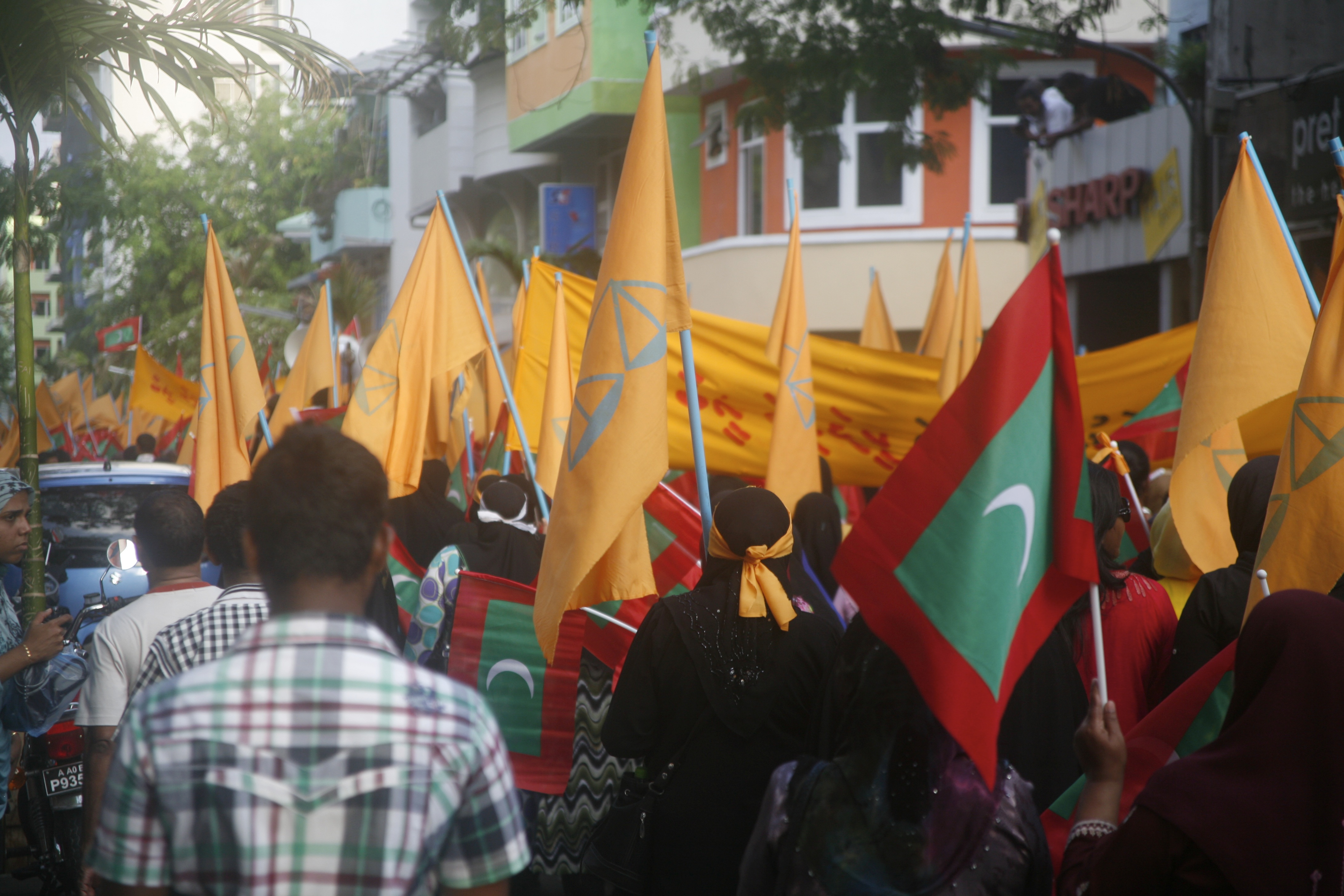 IWD Male', Maldives